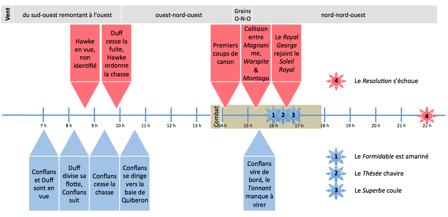 Frise chronologique de la Bataille des Cardinaux.